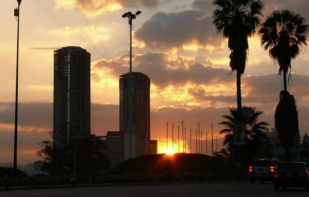 Parque Central - Caracas